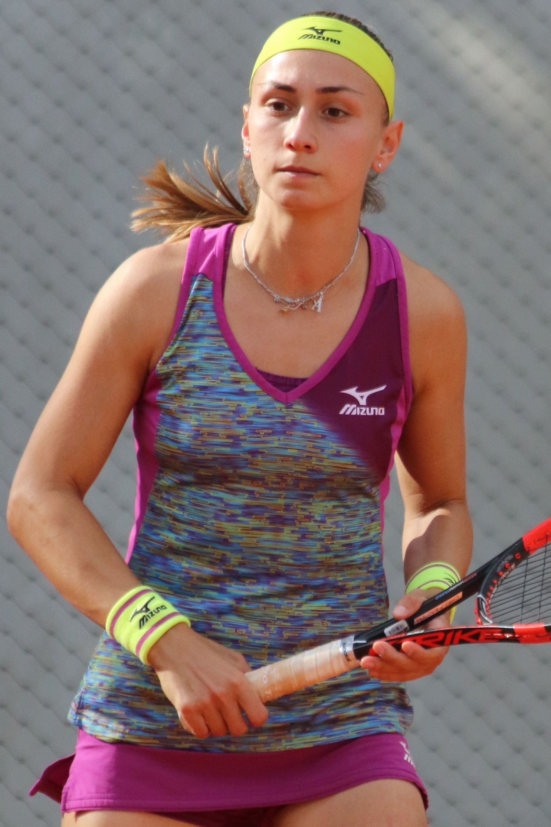 Krunic RG18 (8)